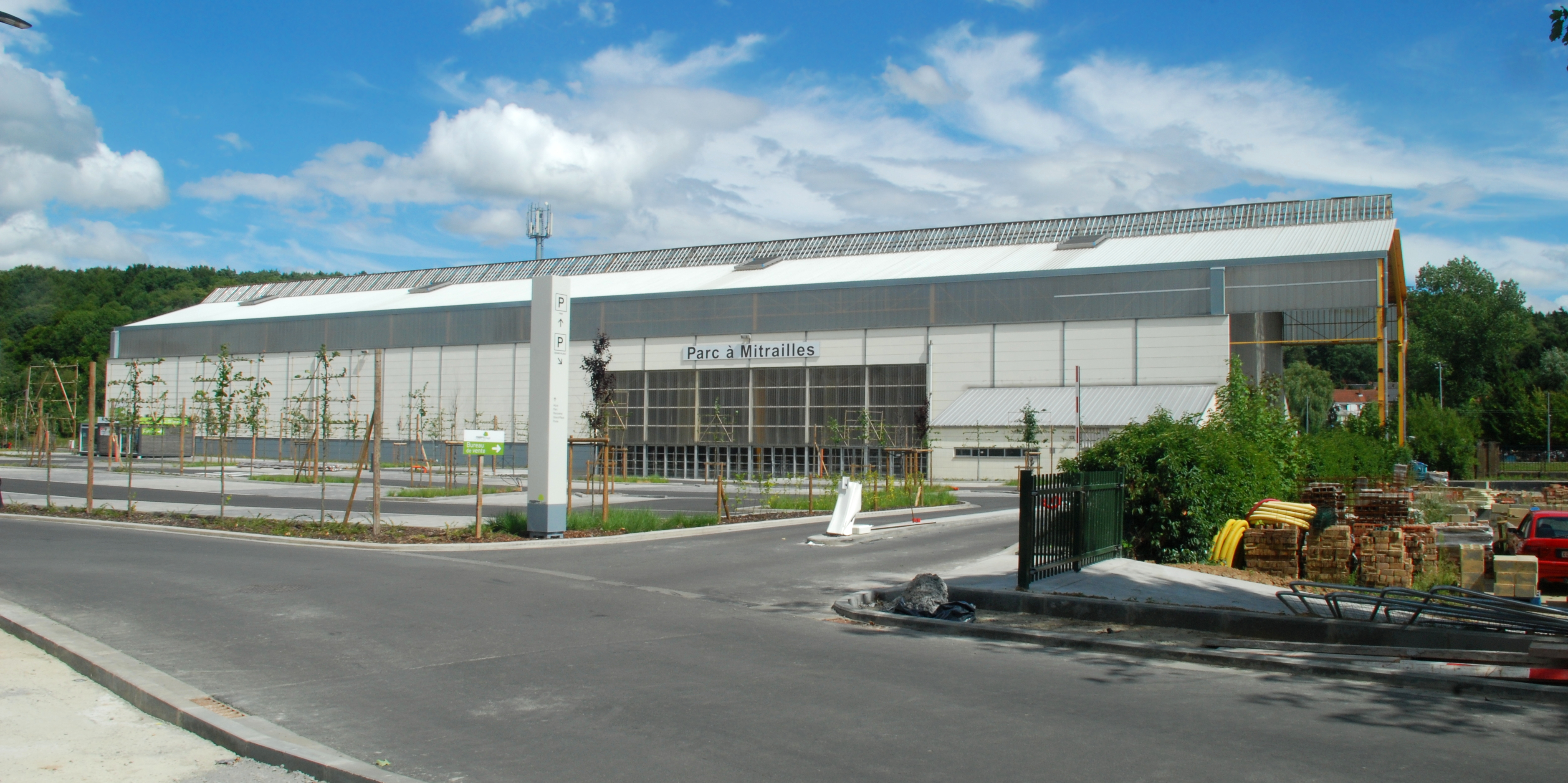 Belgique - Brabant wallon - Court-Saint-Étienne - Anciennes usines Henricot - Parc à Mitrailles